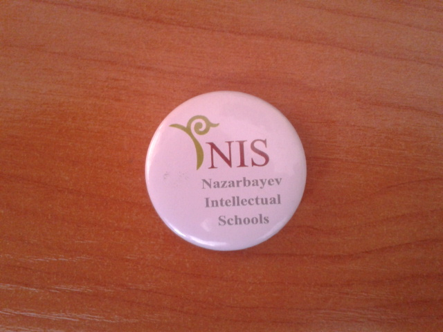 Оқушылардың ТӨСБЕЛГІСІ